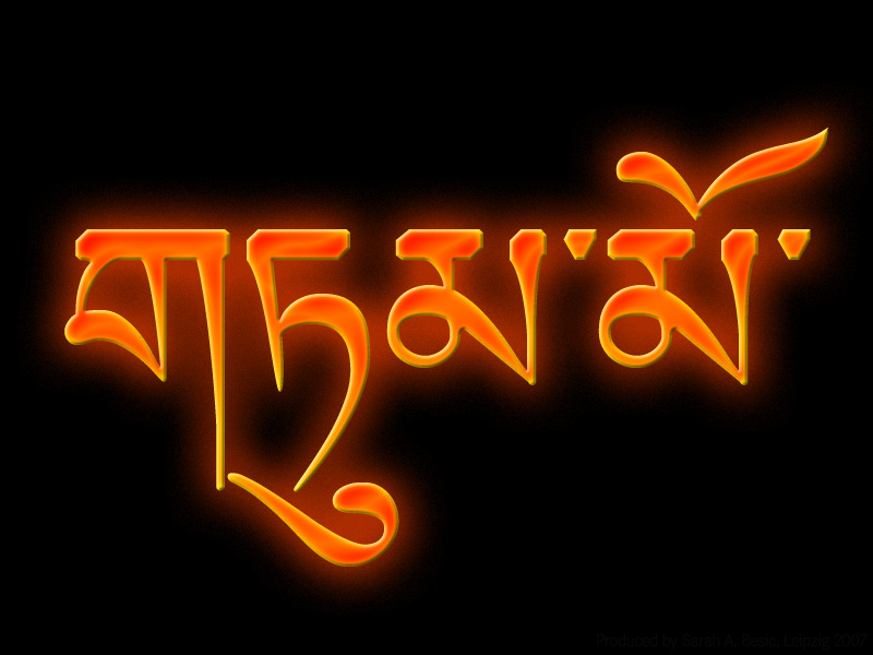 Typografische Darstellung des tibetischen Wortes Tumo (inneres Feuer)